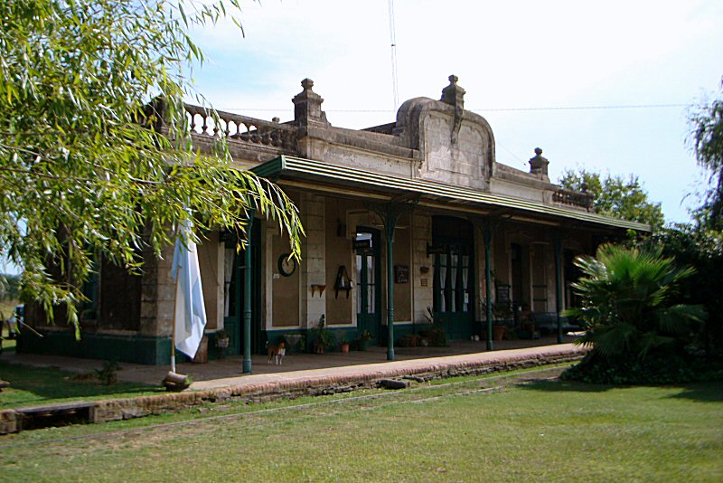 Estación Gouin del FCGB, ex FFCC CGBA